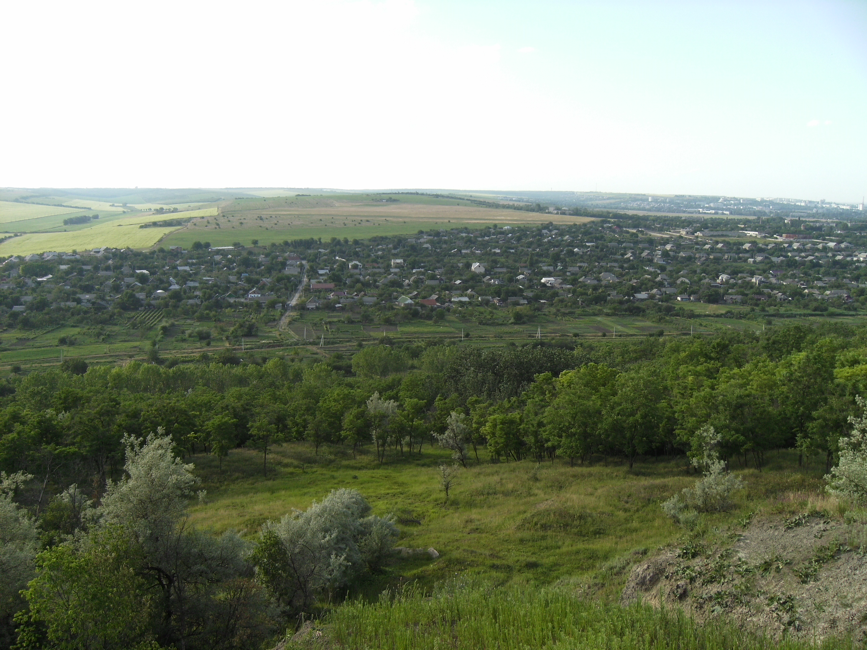 Вид на Гиску с Суворовской горы